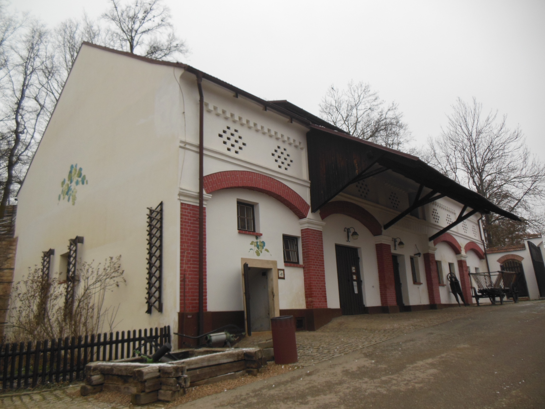 Statek Lüftnerka č. p. 897/14 v ulici Pod Vinicemi v areálu ZOO Plzeň. Horní budova Lüftnerky.